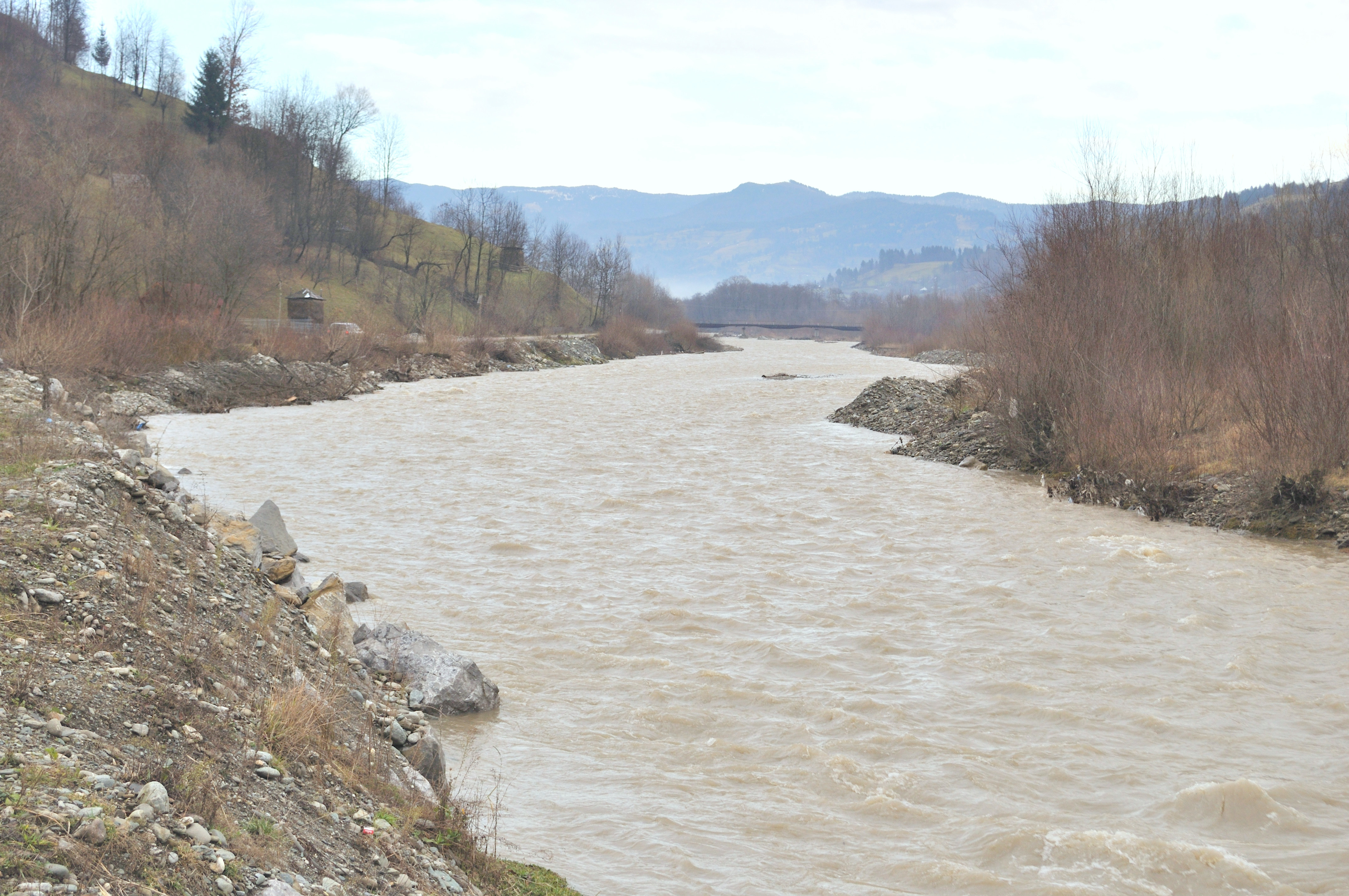 valea râului Ruscova la Repedea, județul Maramureș